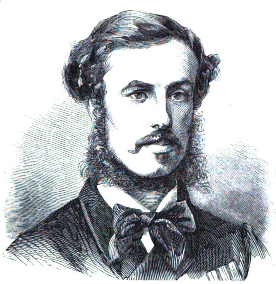 Le capitaine Mariz-e-Barros, mort au bombardement d'Itapiru.